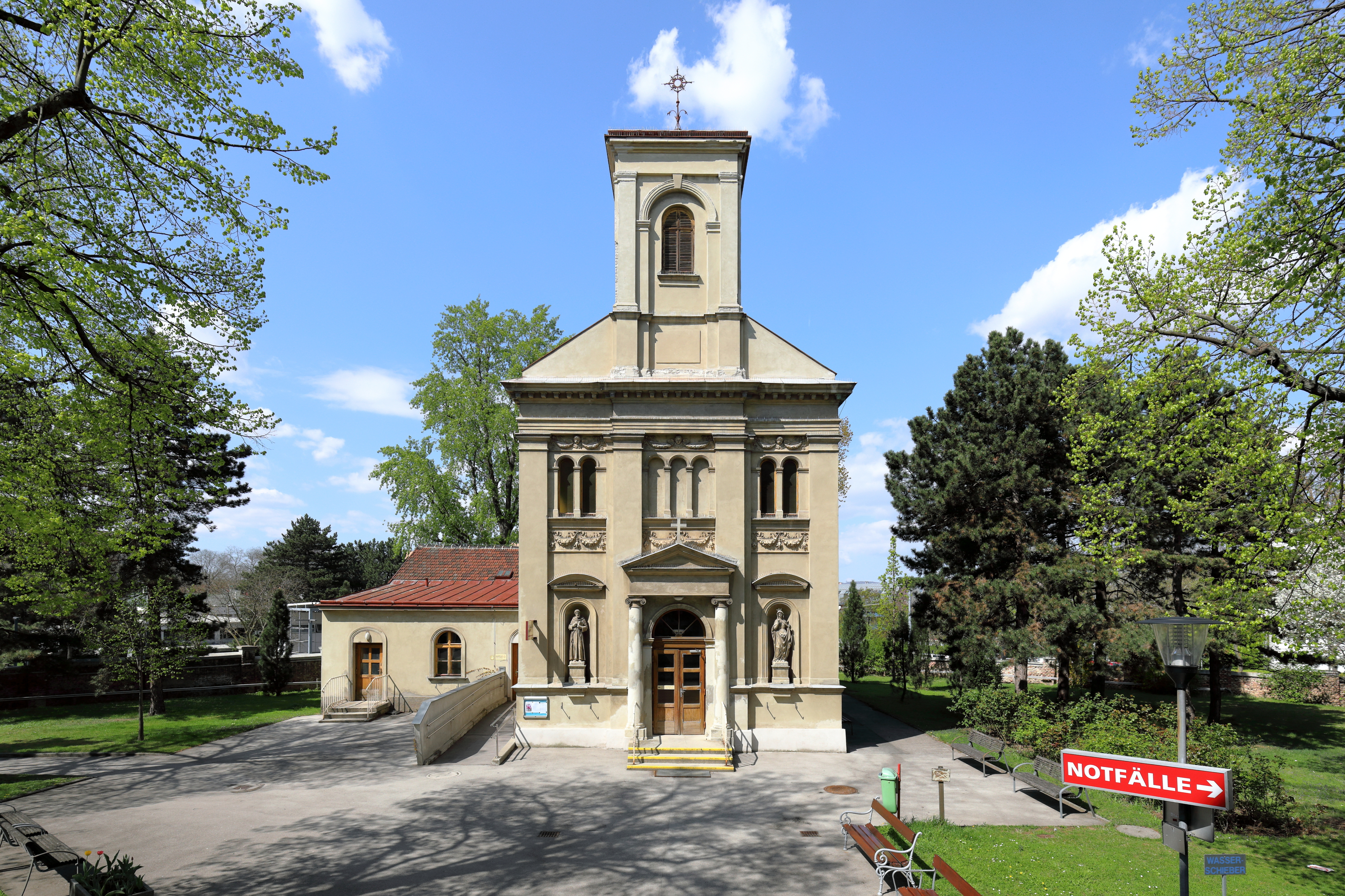 Die Spitalskapelle zum Göttlichen Erlöser des Kaiser-Franz-Josef-Spitals (heute: Sozialmedizinisches Zentrum Süd) im 10. Wiener Gemeindebezirk Favoriten und links angebaut die ehemalige Priesterwohnung. Die freistehende Saalkirche mit einer eintürmigen Fassade und einer Neorenaissance-Gliederung wurde 1890/91 errichtet und war ursprünglich der hl. Barbara geweiht. Die Figuren in den Nischen stellen die hl. Elisabeth von Thüringen und den hl. Franz von Assisi dar.